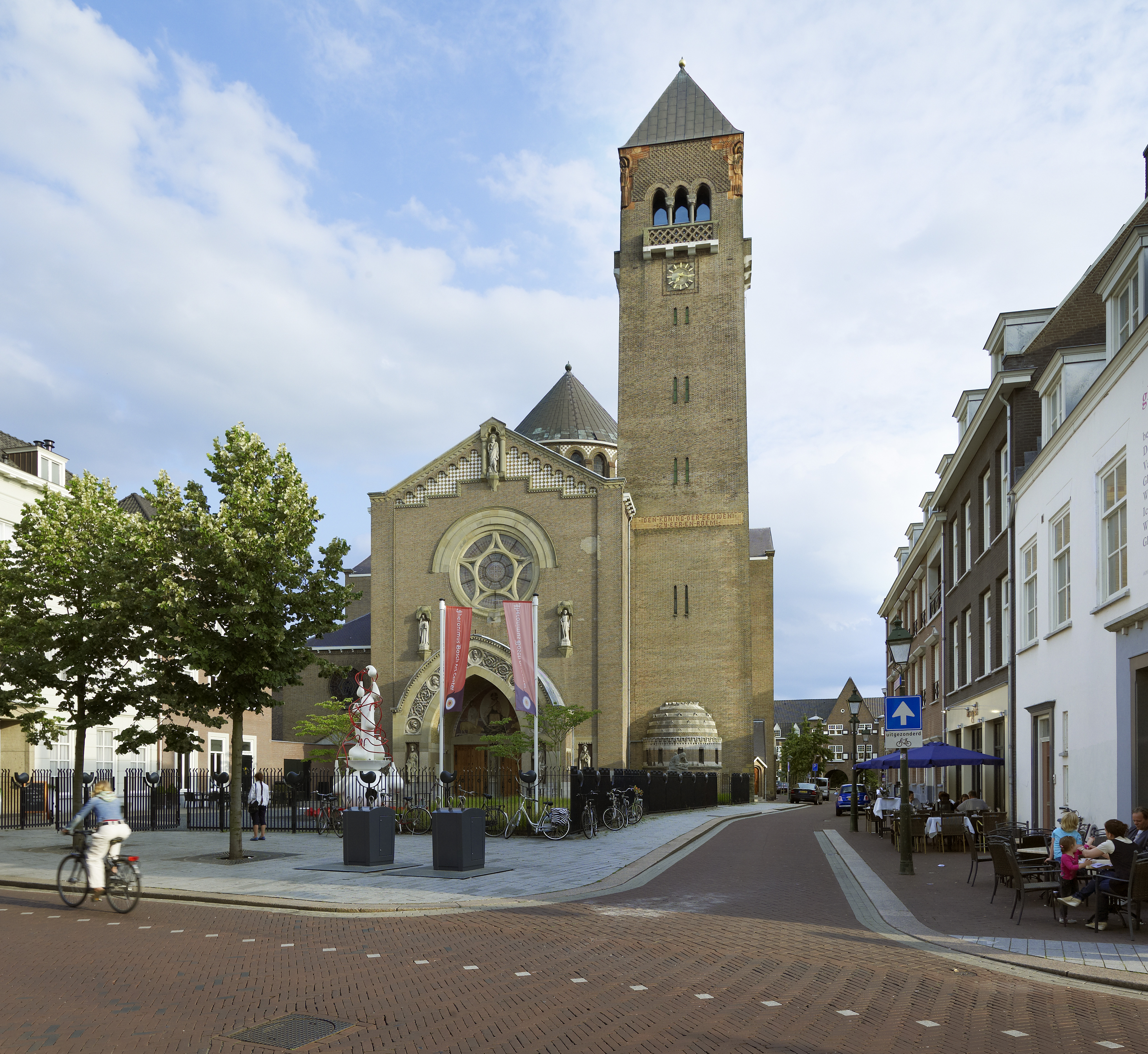 Sint Jacobskerk: Overzicht westgevel met klokketoren